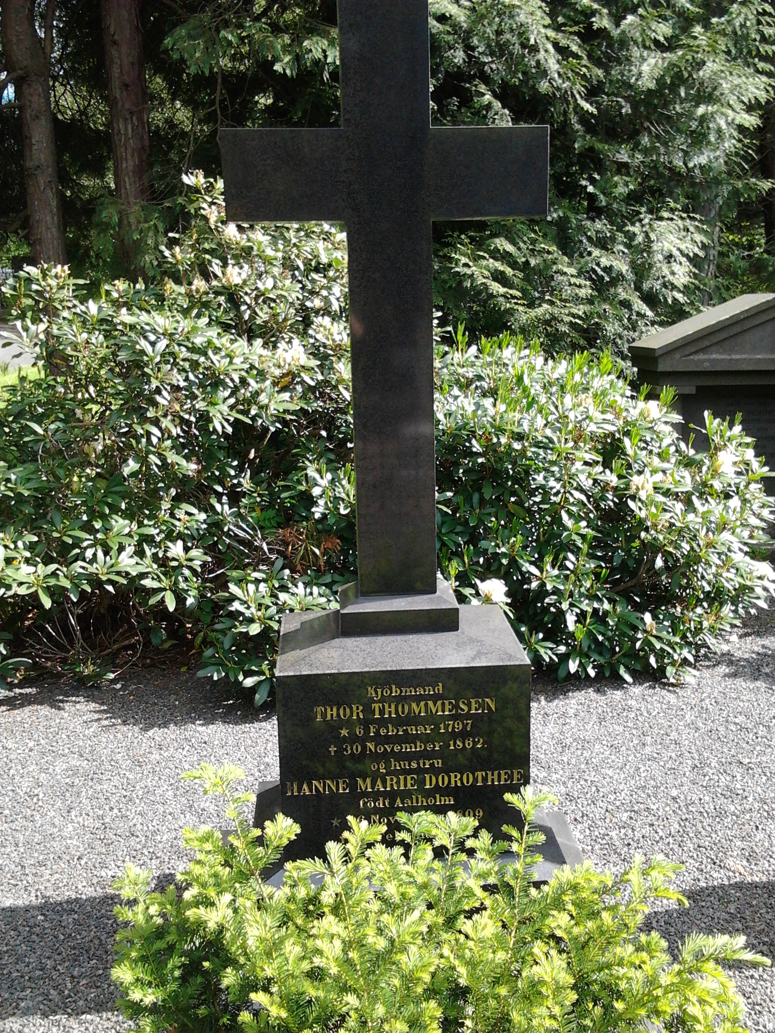 Grav på Arendal kirkegård